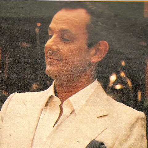 Gato dumas cocinero argentino